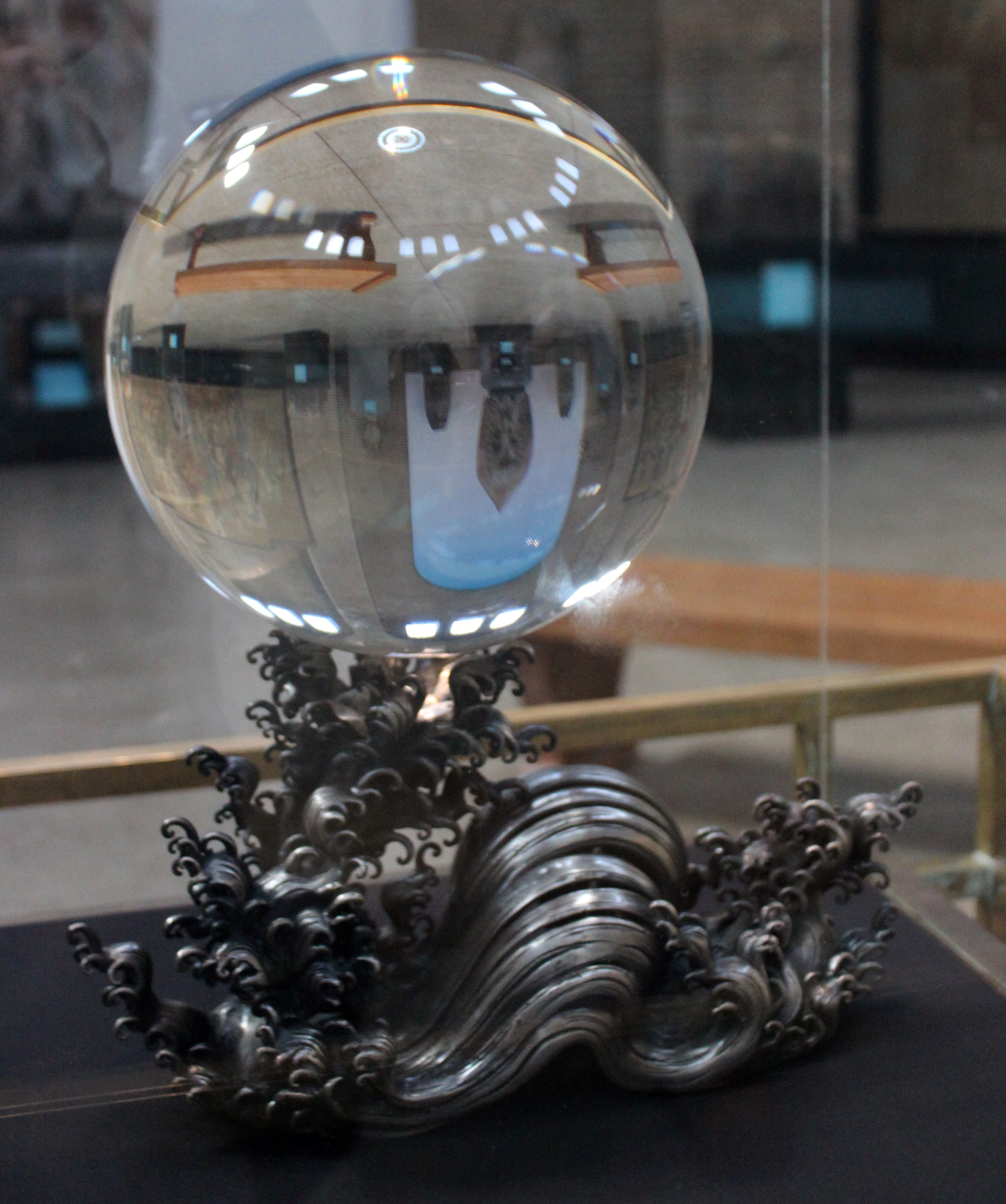 Esfera de cristal de roca. Dinastía Qing. Penn University Museum.